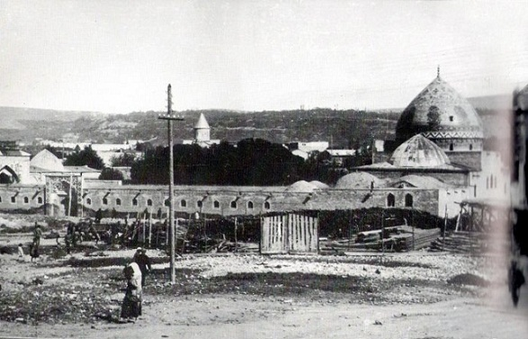 Yerevan fortress in 1900s Երևանի բերդը 1900-ական թթ.